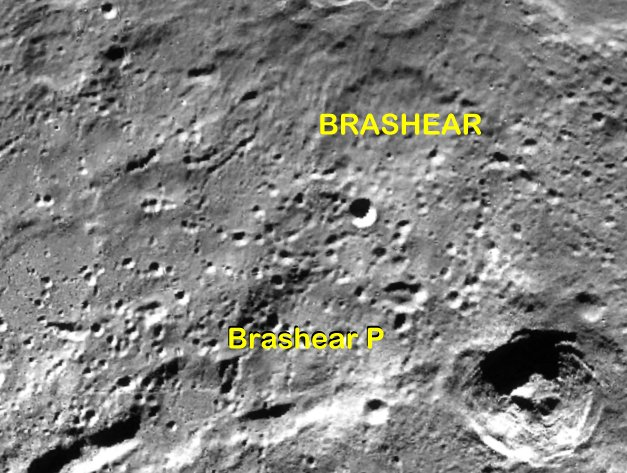 Cráter lunar Brashear. Cráteres satélite. (Imagen LRO)